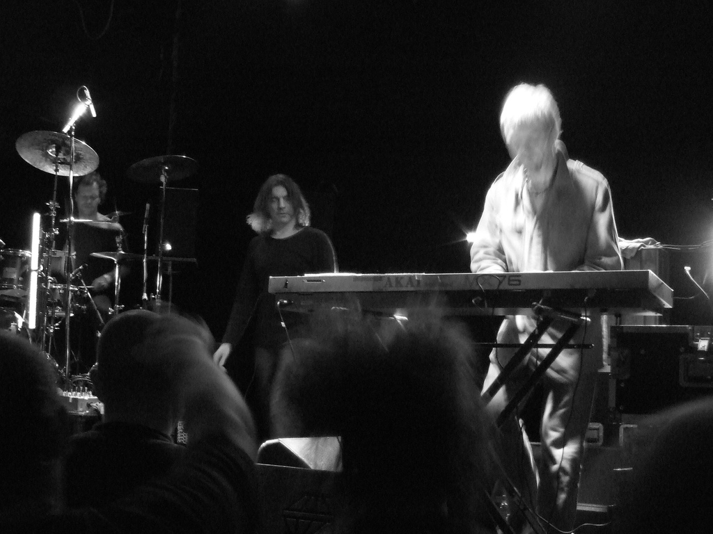 A banda Young Gods em 2007